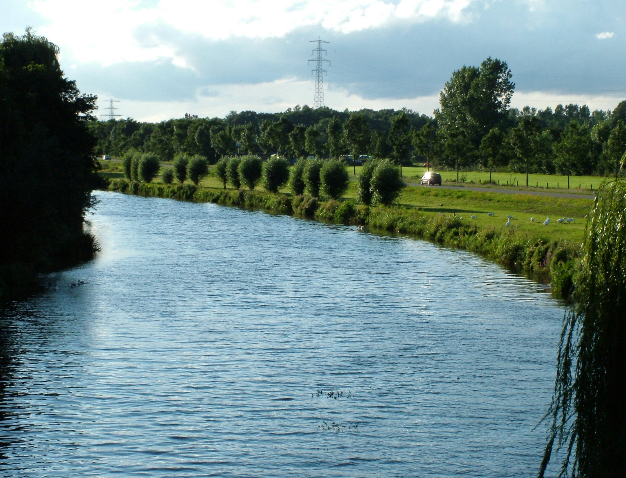 Oude IJssel, tussen Ulft en Silvolde